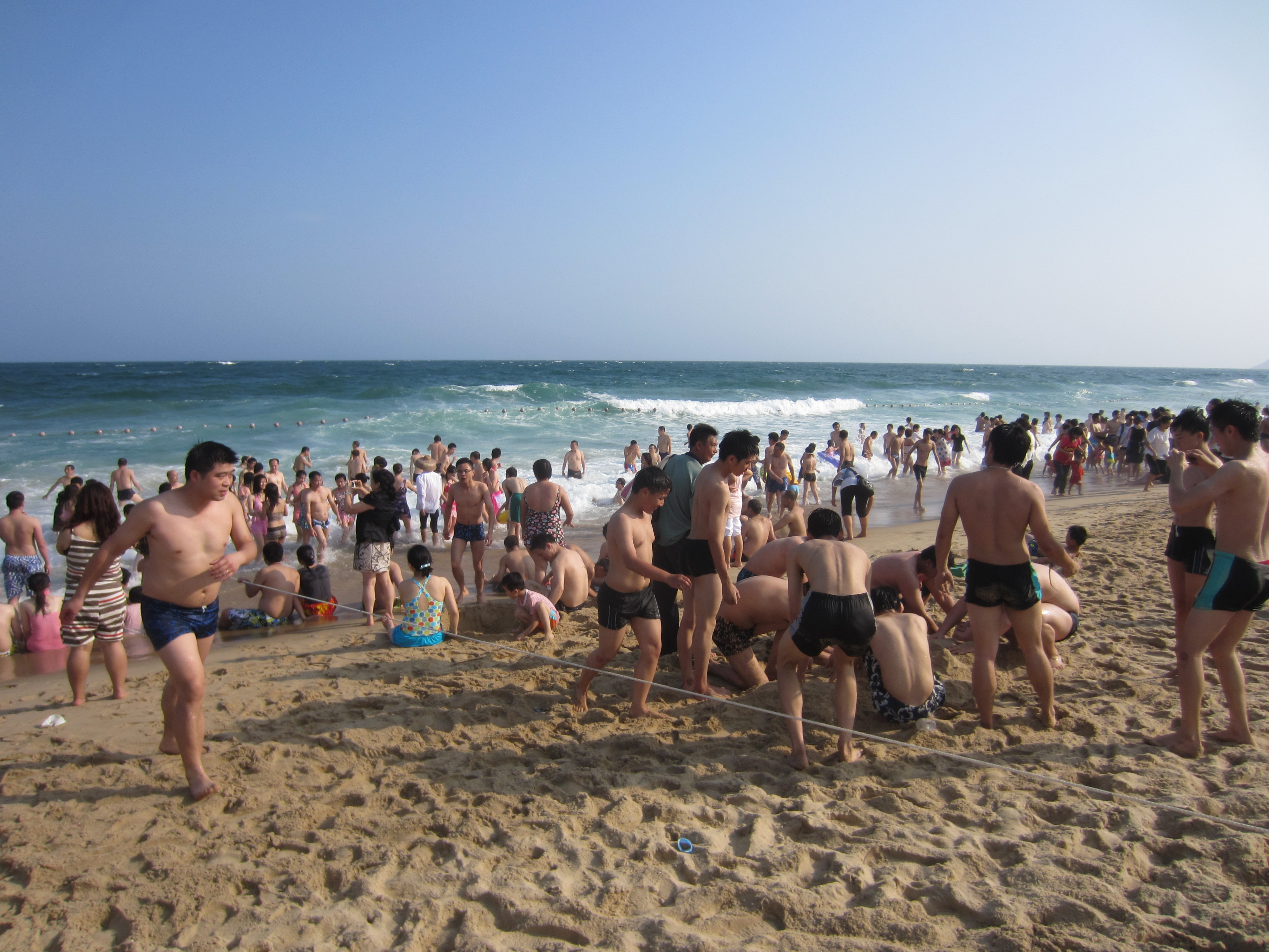 Panorama 5